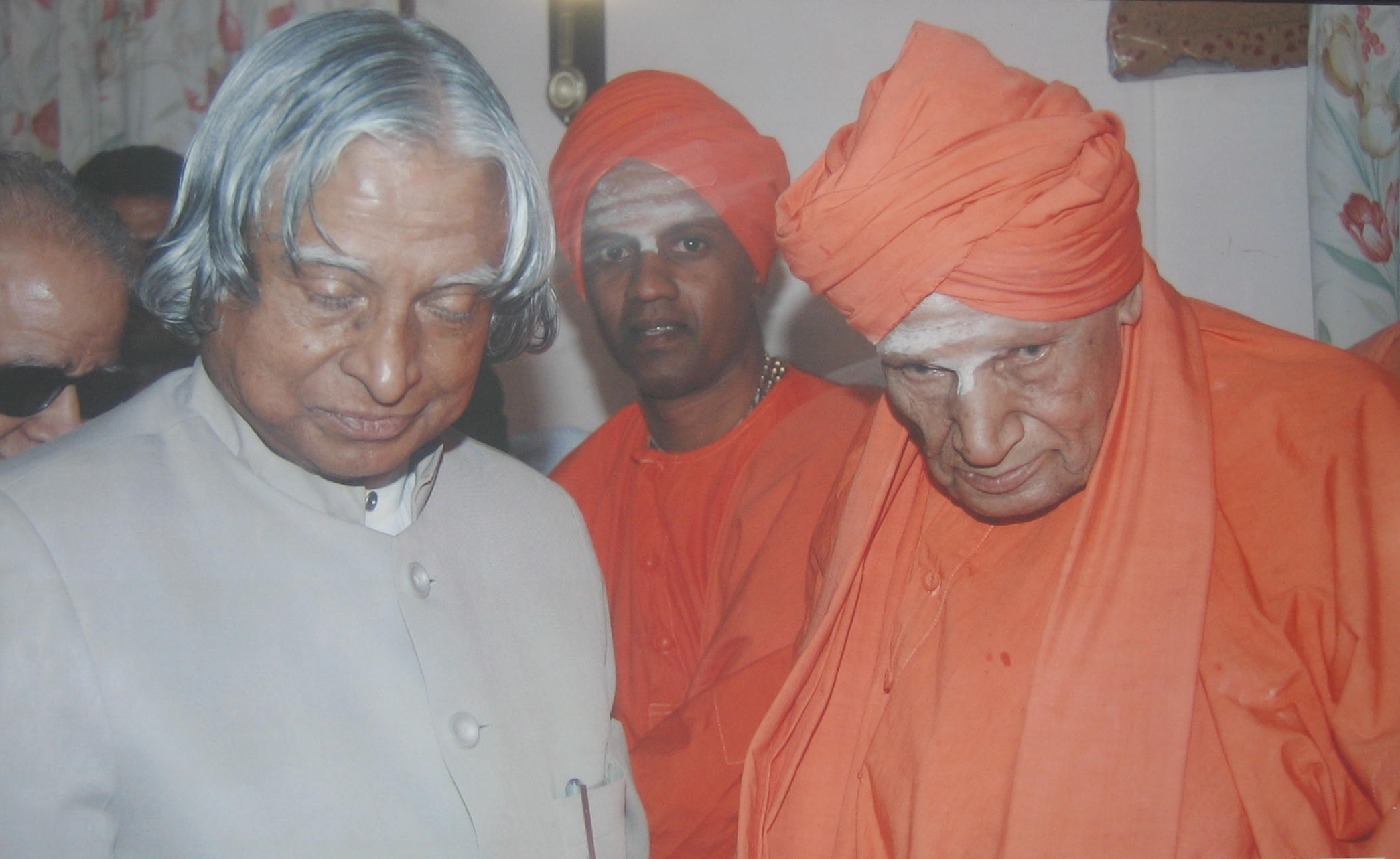 Dr. Sree Shivakumara Swamiji along with Indian President Dr. Abdul Kalam Depicted people: A. P. J. Abdul Kalam and Shivakumara Swamiji